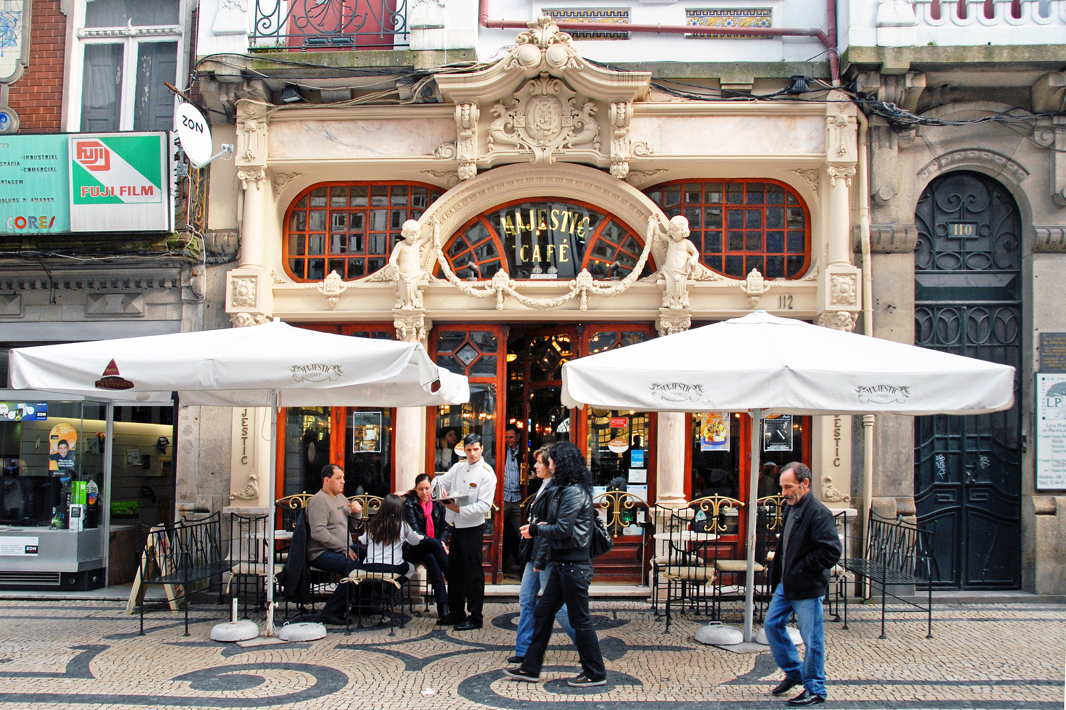 Café Majestic This file was uploaded for Wiki Loves Monuments in Portugal with the unique identifier 74502.